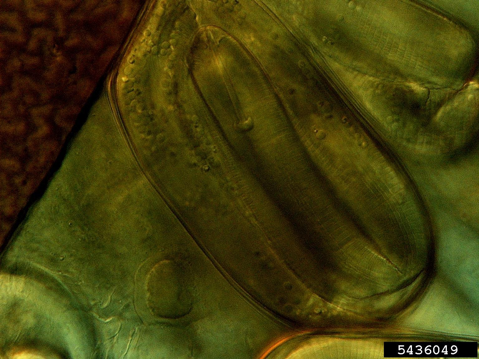 Heteroderidae nematodes eggs at Rubus spp.